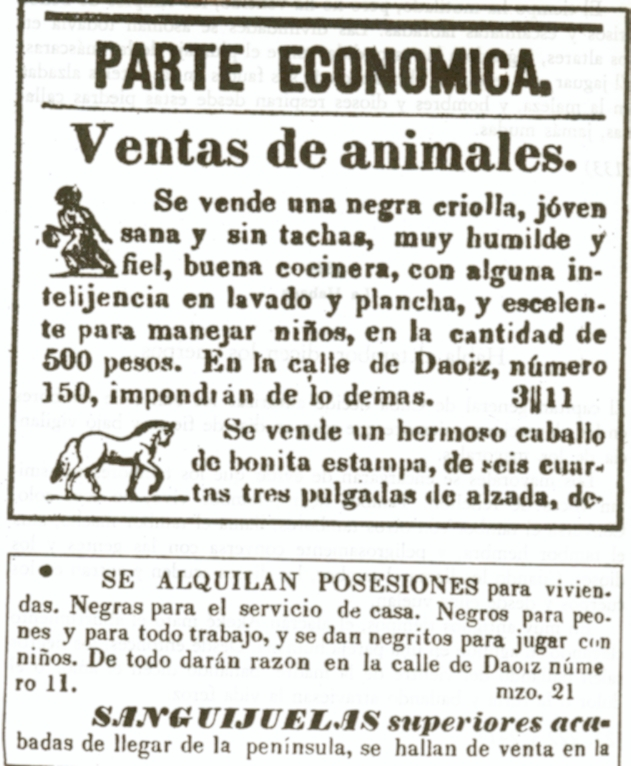 Anuncio publicado en la prensa cubana de La Habana, en 1839. En el mismo anuncio se venden negros esclavos, caballos y sanguijuelas